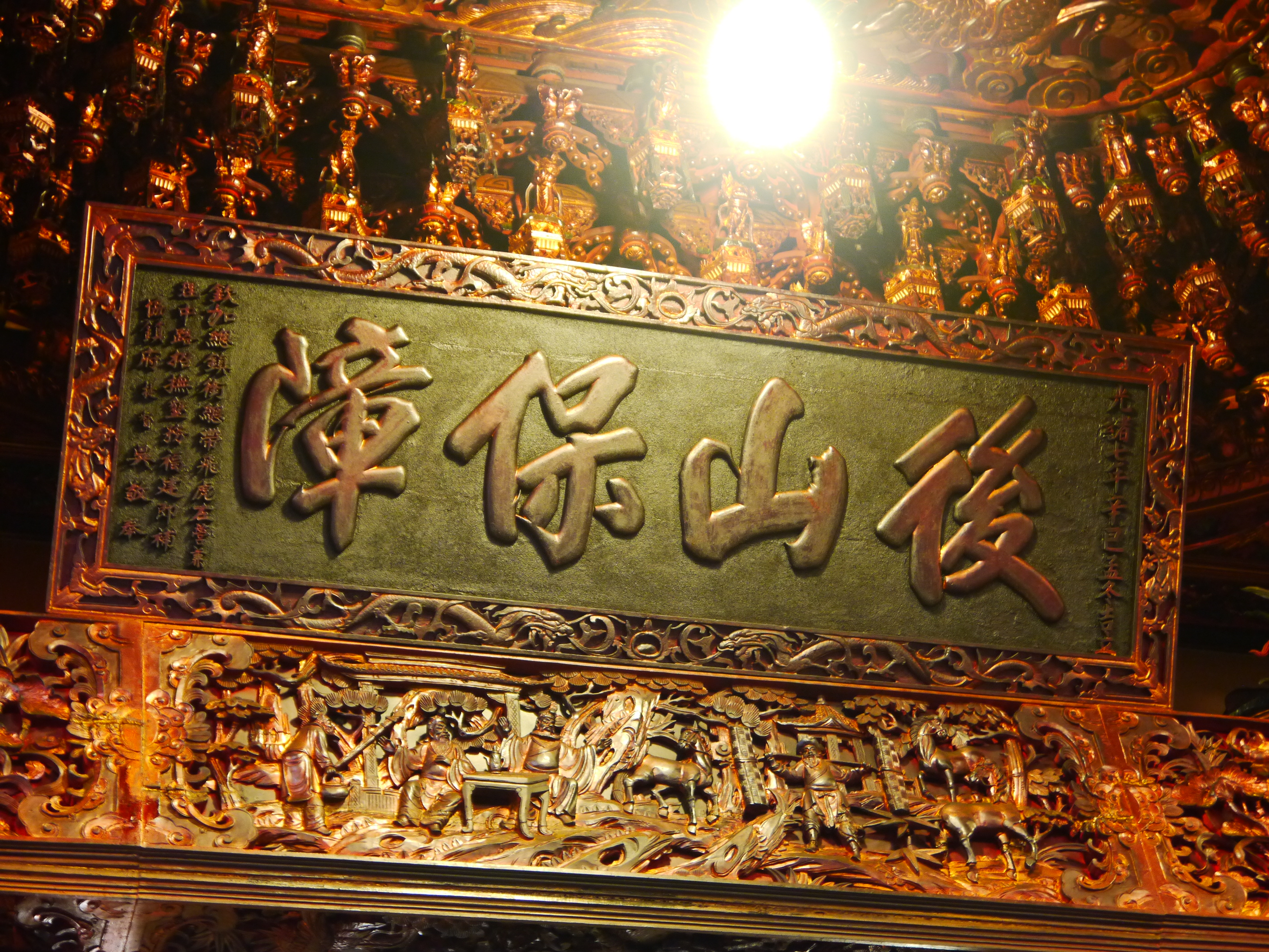 花蓮玉里協天宮